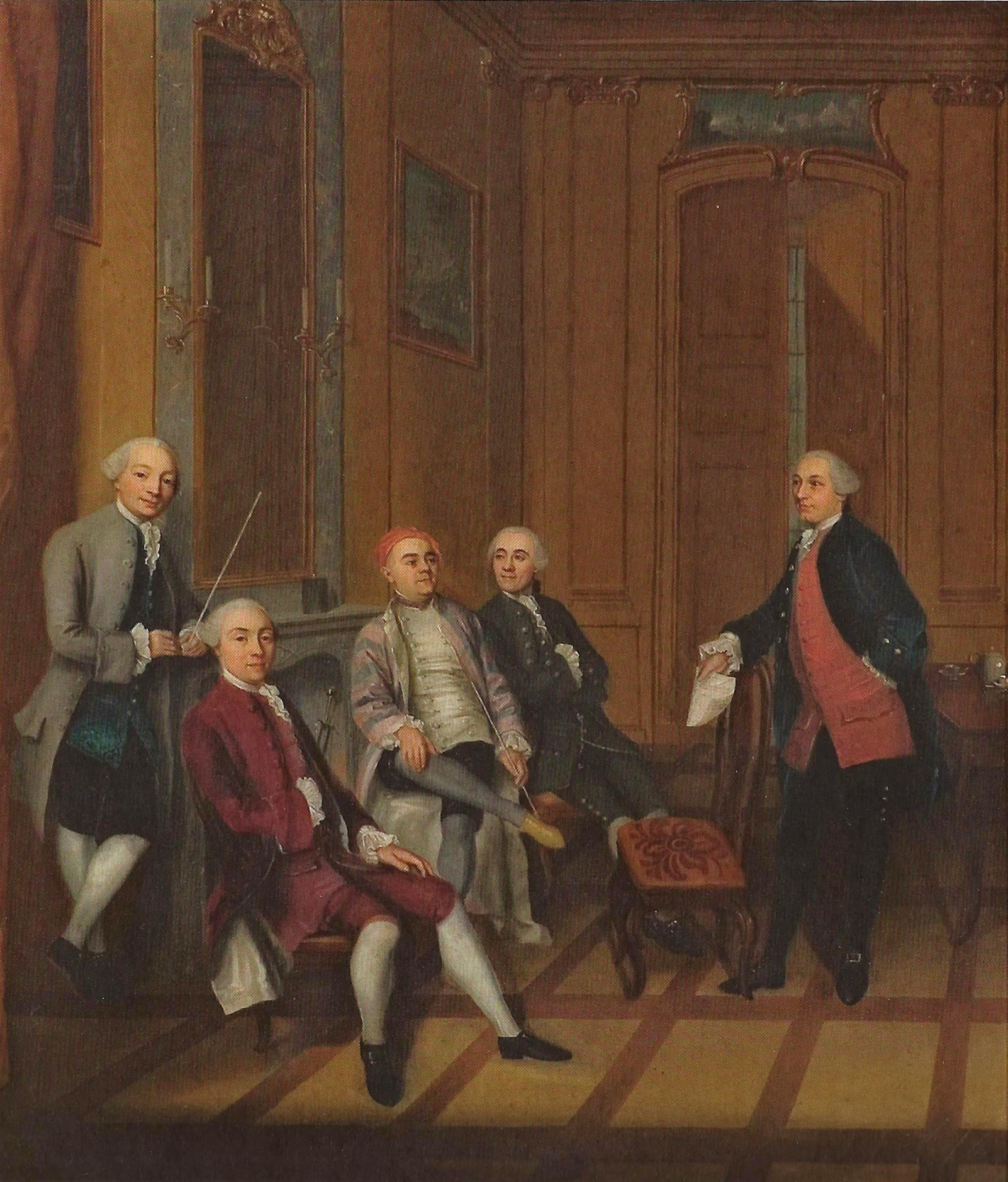 Dargestellt sind: Friedrich Lienhard, Karl Friedrich Bucher, Abraham Wild, Paul Friedrich Otth und Albrecht Herport.